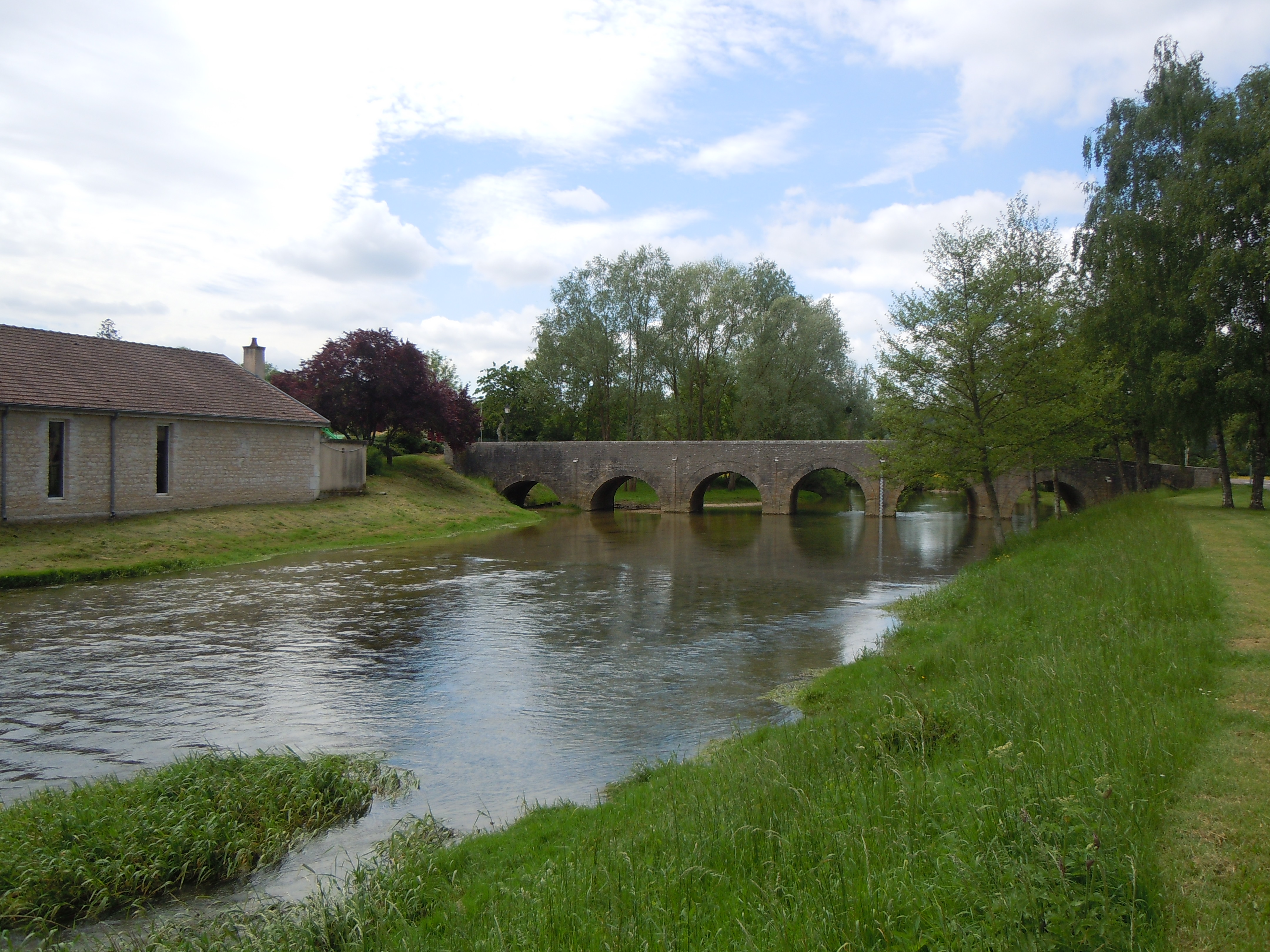 Pont sur l'Ouche à Fleurey-sur-Ouche